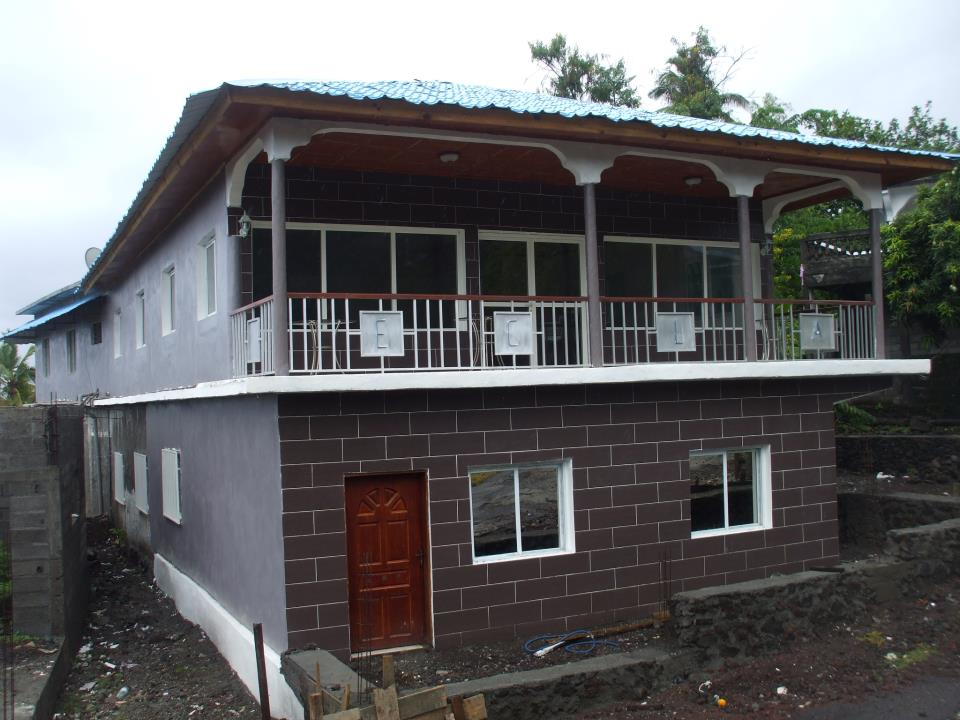 bibliotheque de chouani ( upload : Karim M. )